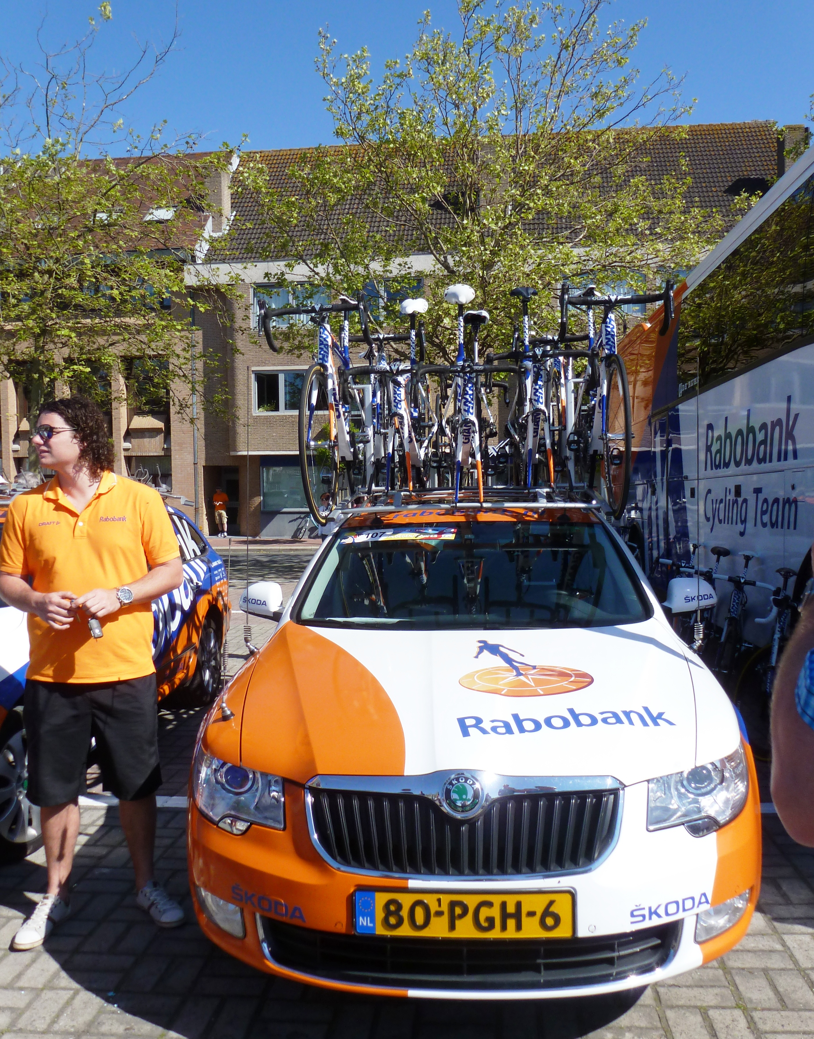 Begleitfahrzeug des Radsportteams 2012 Rabobank